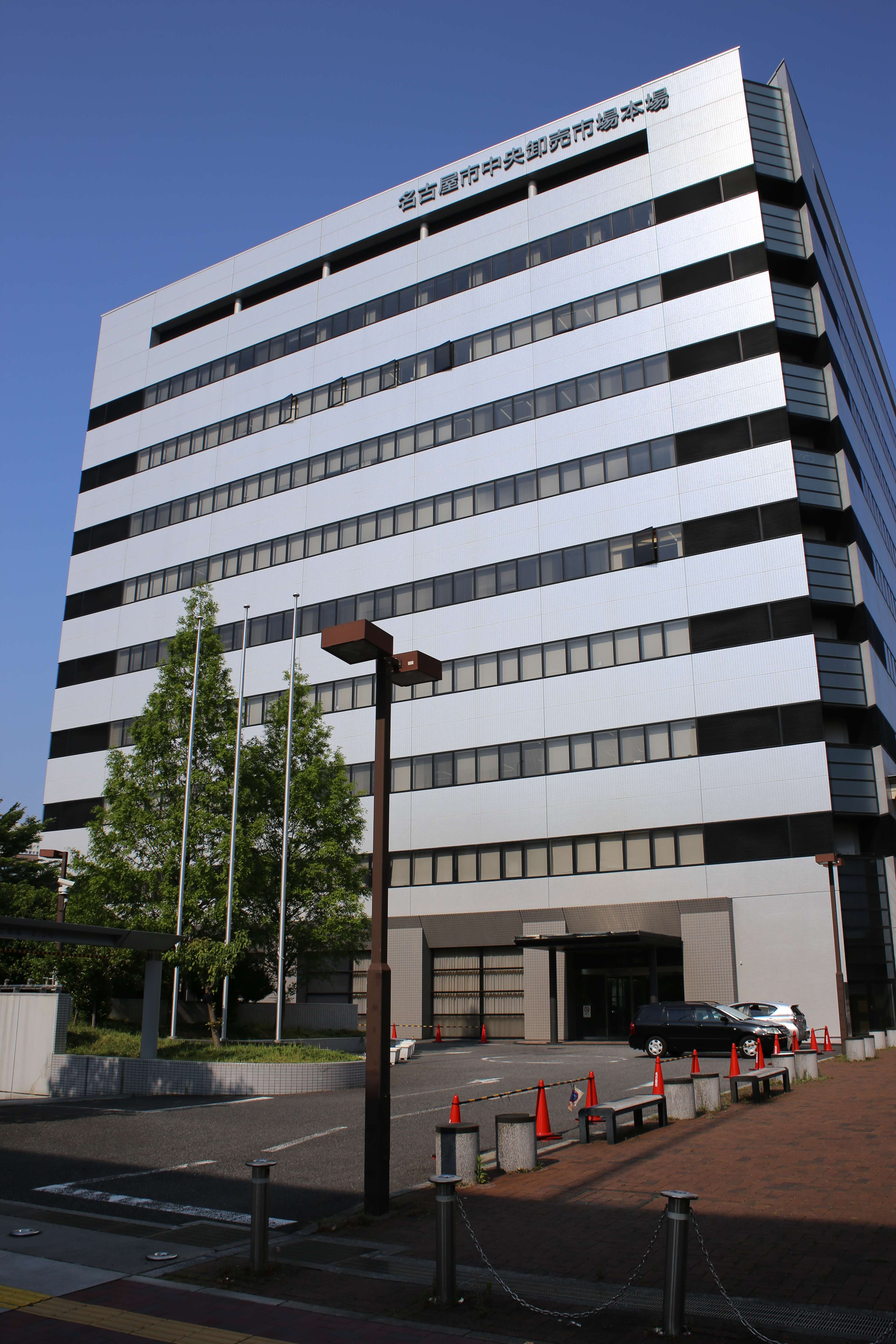 名古屋市熱田区川並町の名古屋市中央卸売市場本場を西側公道南側より撮影